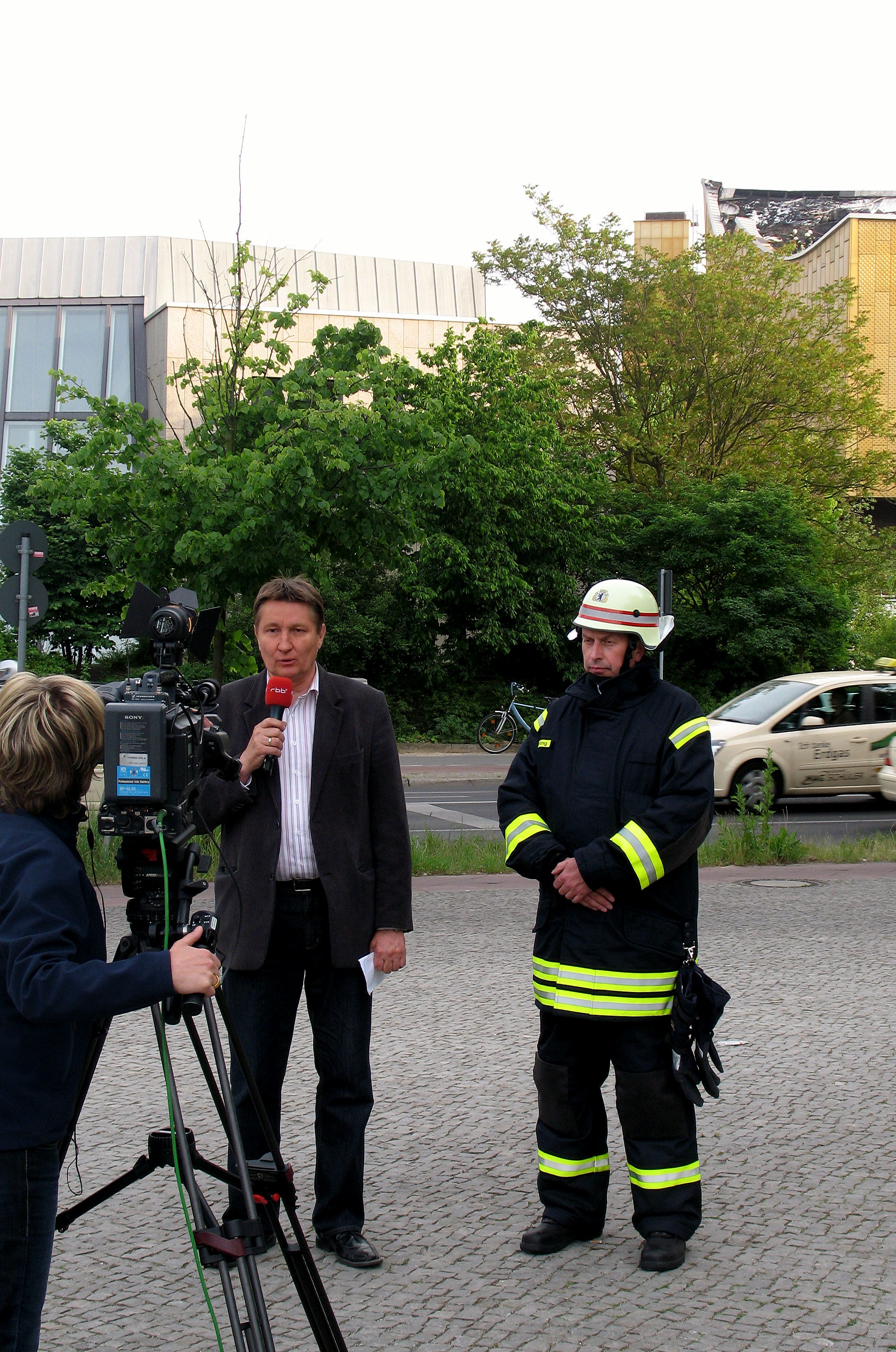 Ulli Zelle berichtet in der Abendschau über den Großbrand auf dem Dach der Berliner Philharmonie Berlin bei ihm Landesbranddirektor Wilfried Gräfling , 20. Mai 2008